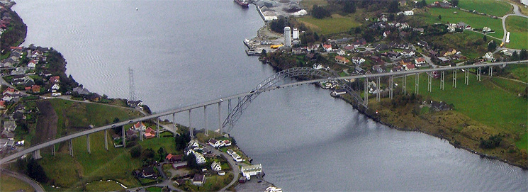 Karmsundbrua (Karmsund bridge) in Karmøy, Norway